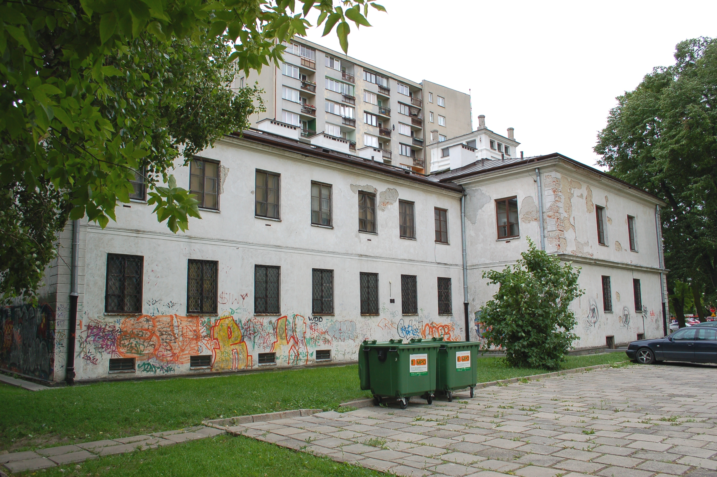 Museum Wola, Warschau